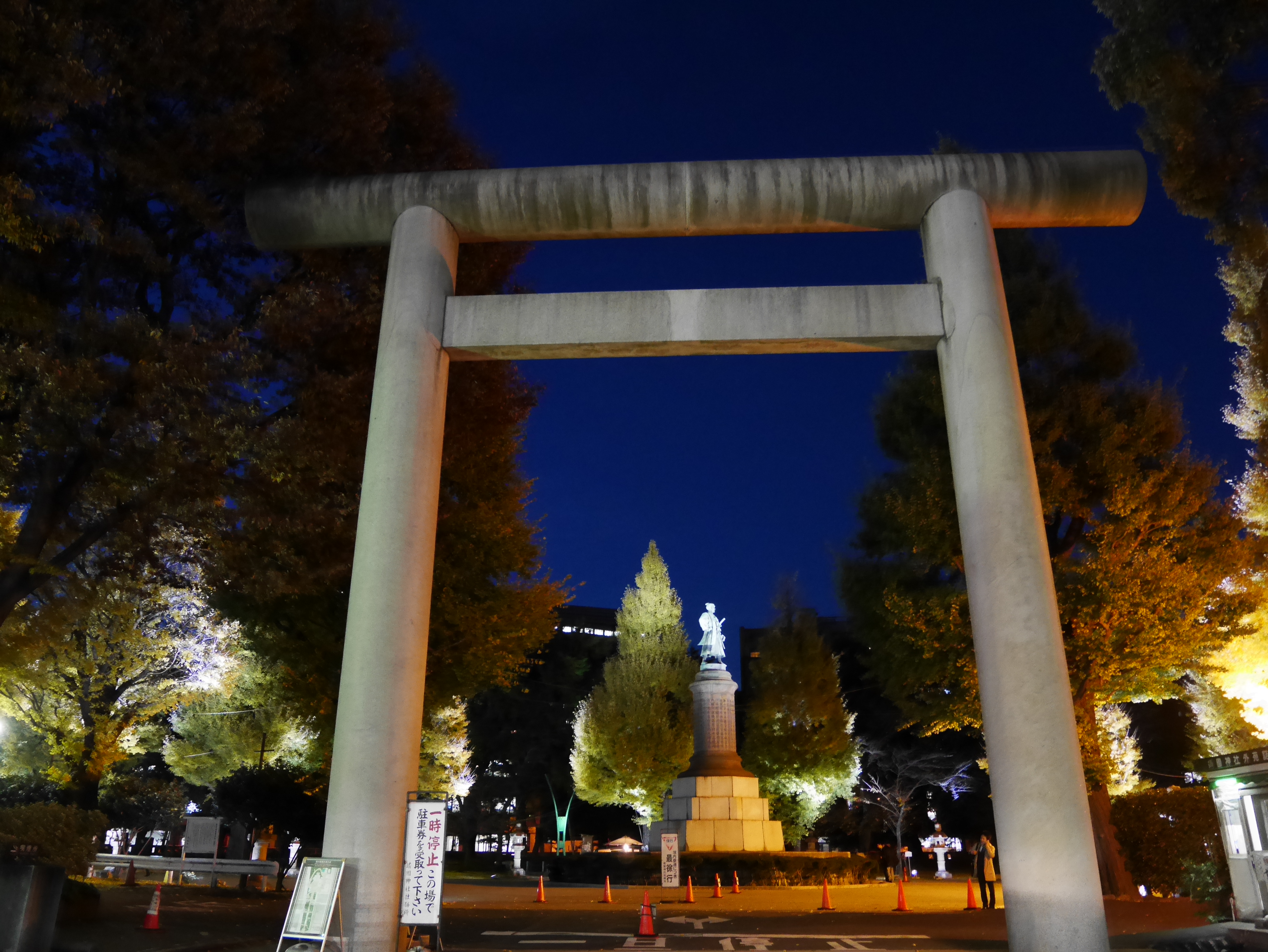 靖国神社大鳥居